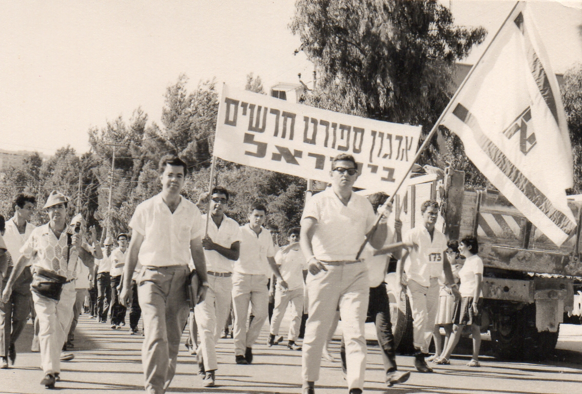 מצעד שנות 50